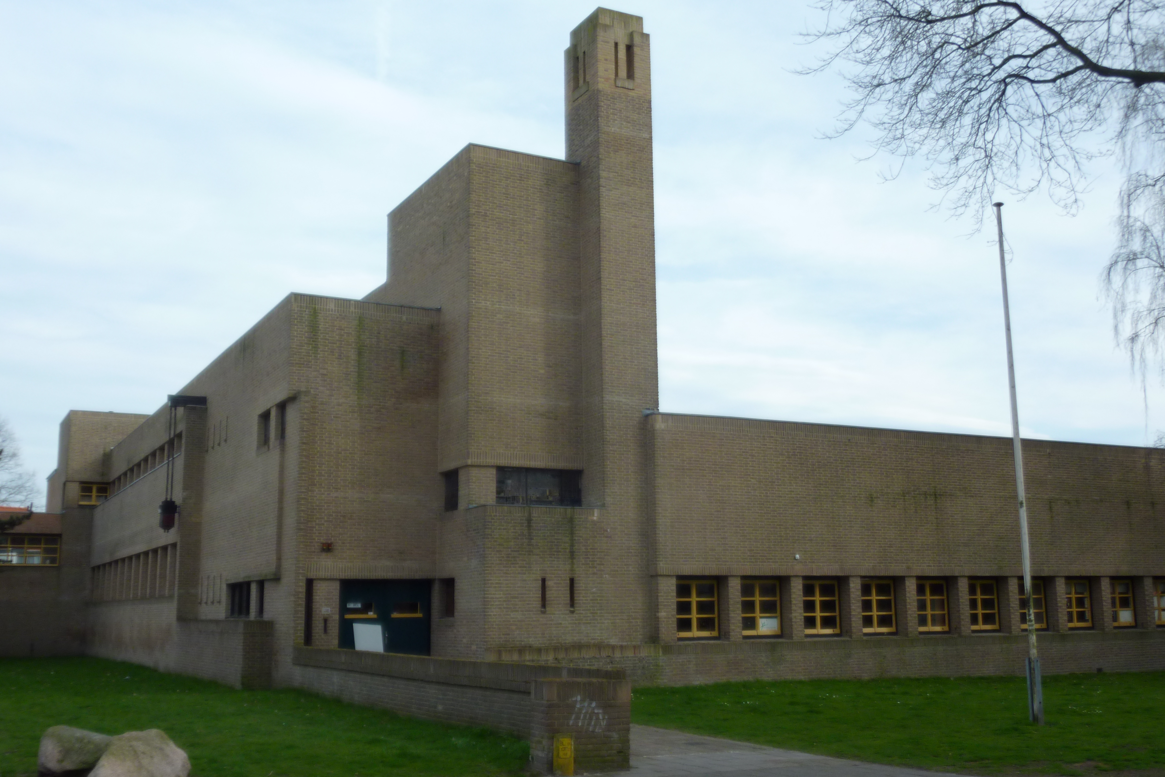 Hilversum: Dr. H. Bavinckschool